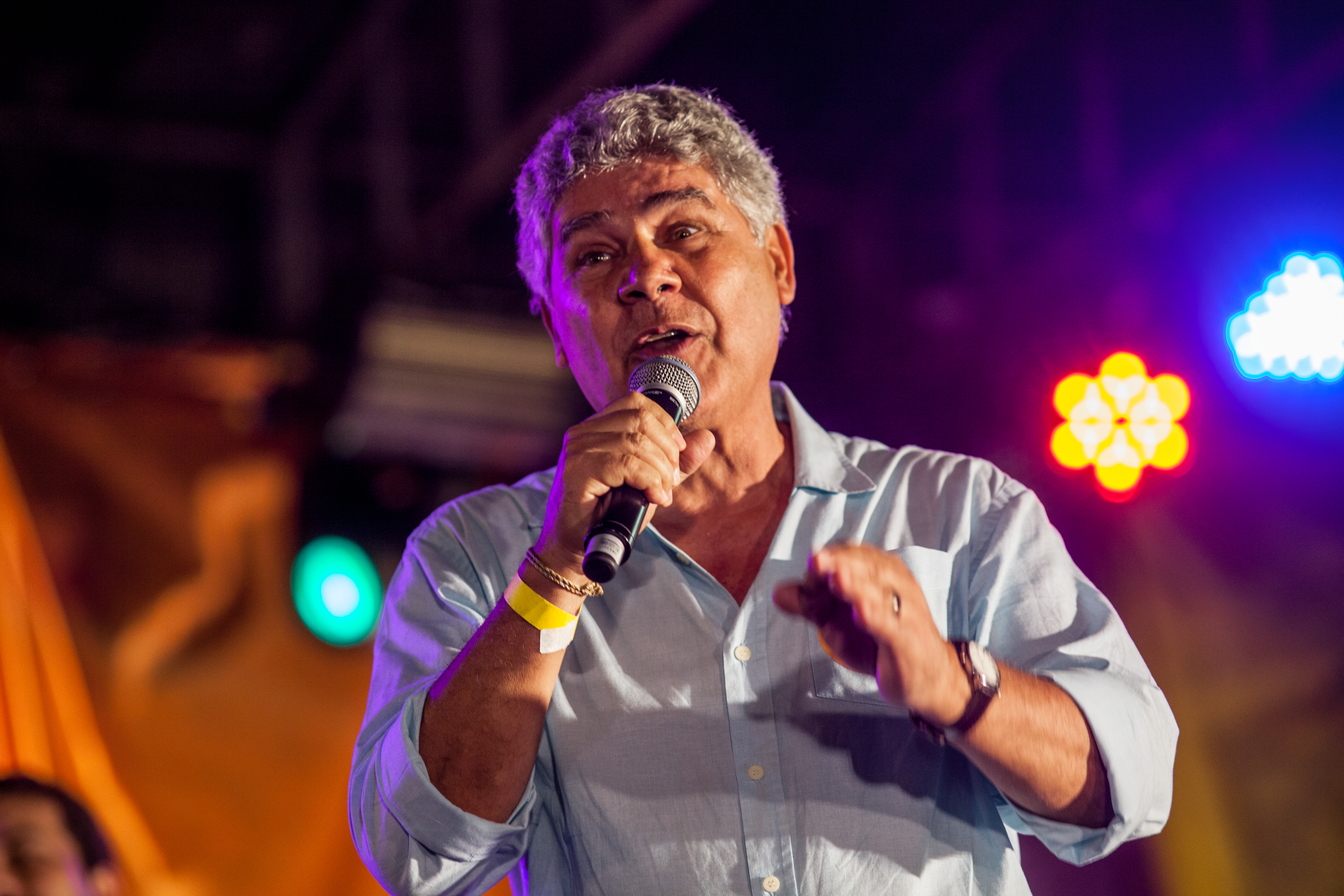 Comício "A Hora é Essa" na Lapa • 26/10/2016 Chico Alencar em campanha de Marcelo Freixo à prefeitura do Rio de Janeiro.